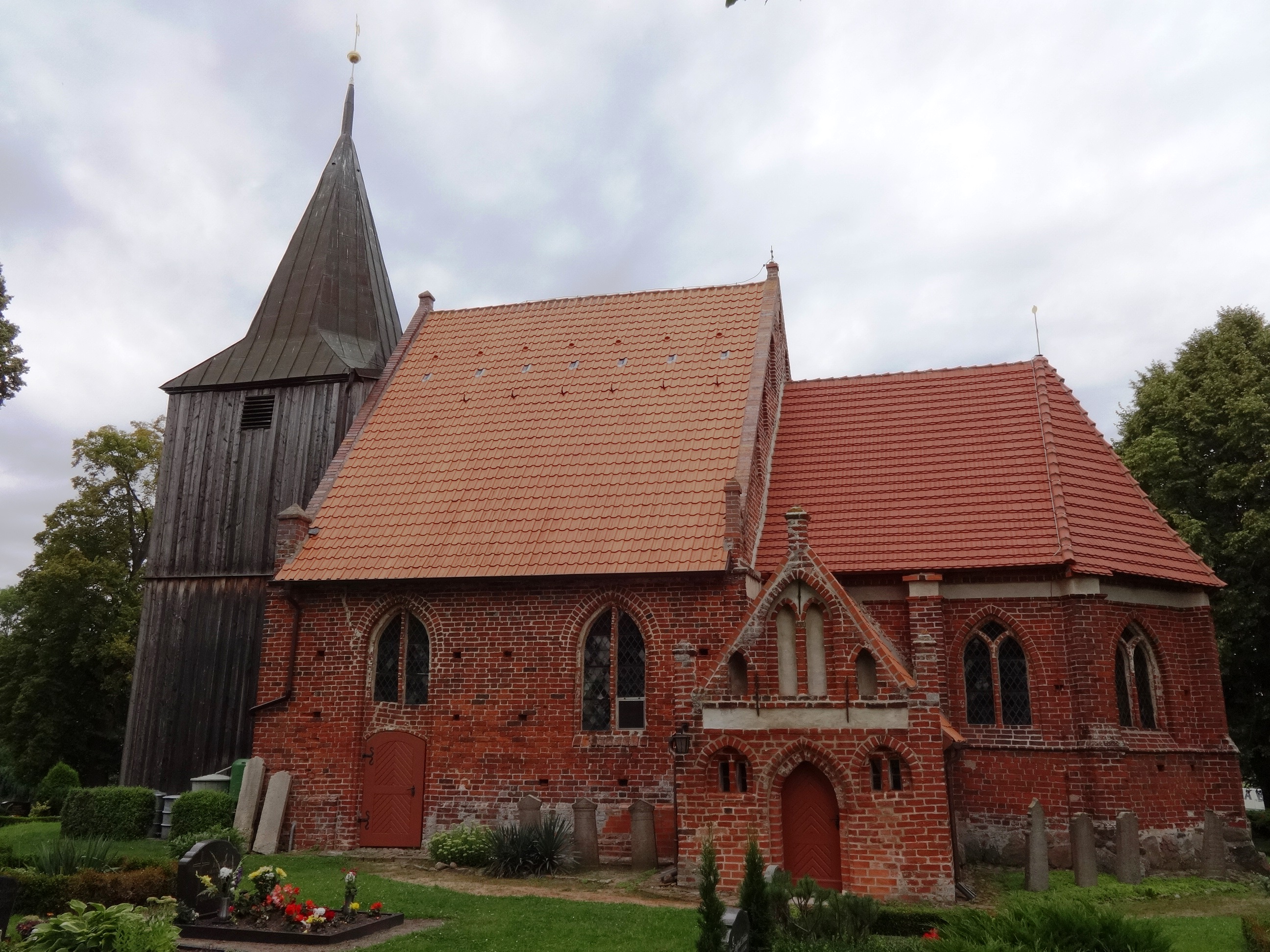 Spätgotische Backsteinkirche in Levenhagen, Mecklenburg-Vorpommern